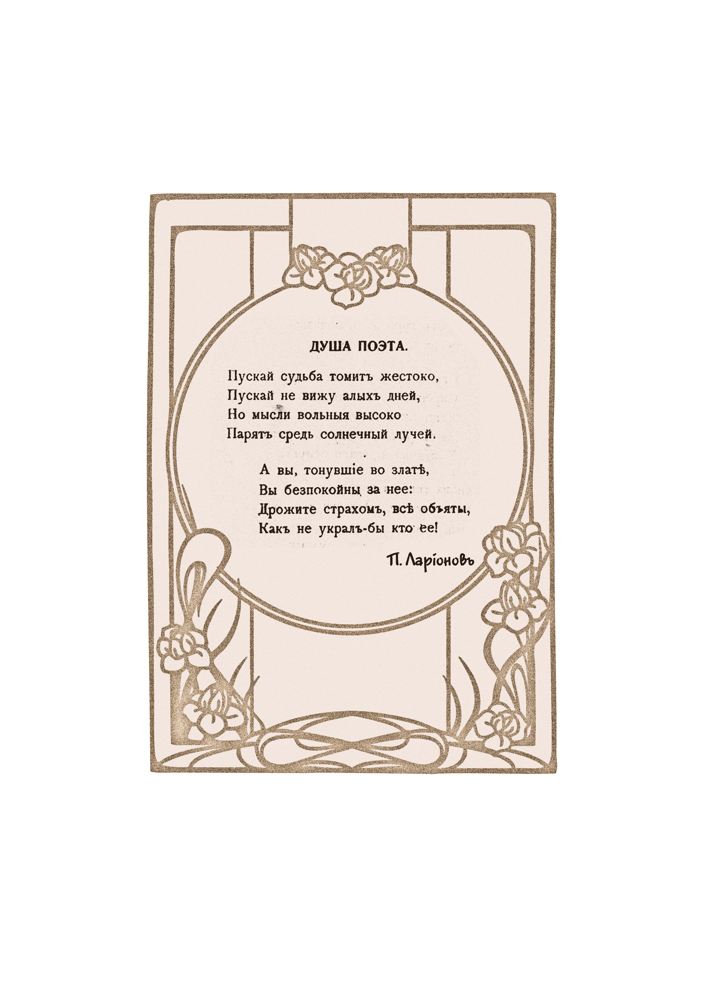 Петр Андреевич Ларионов «Душа поэта»